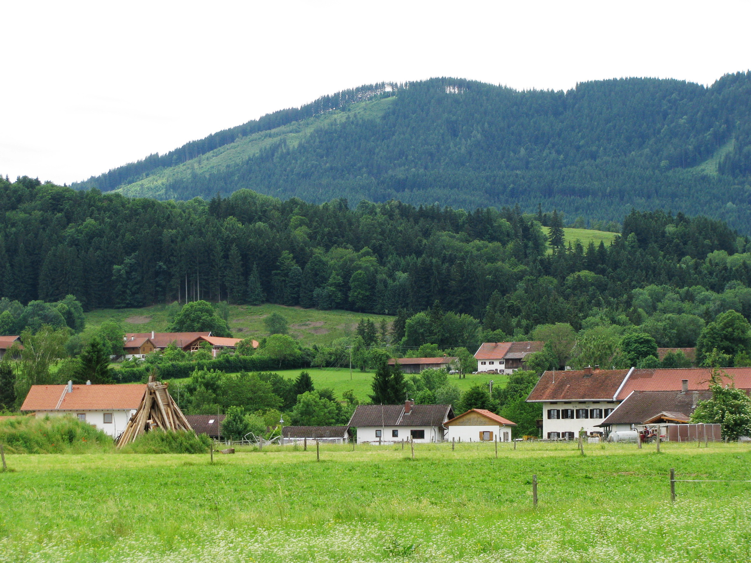 Blomberg von Oberbuchen (Gemeinde Bad Heilbrunn) aus gesehen